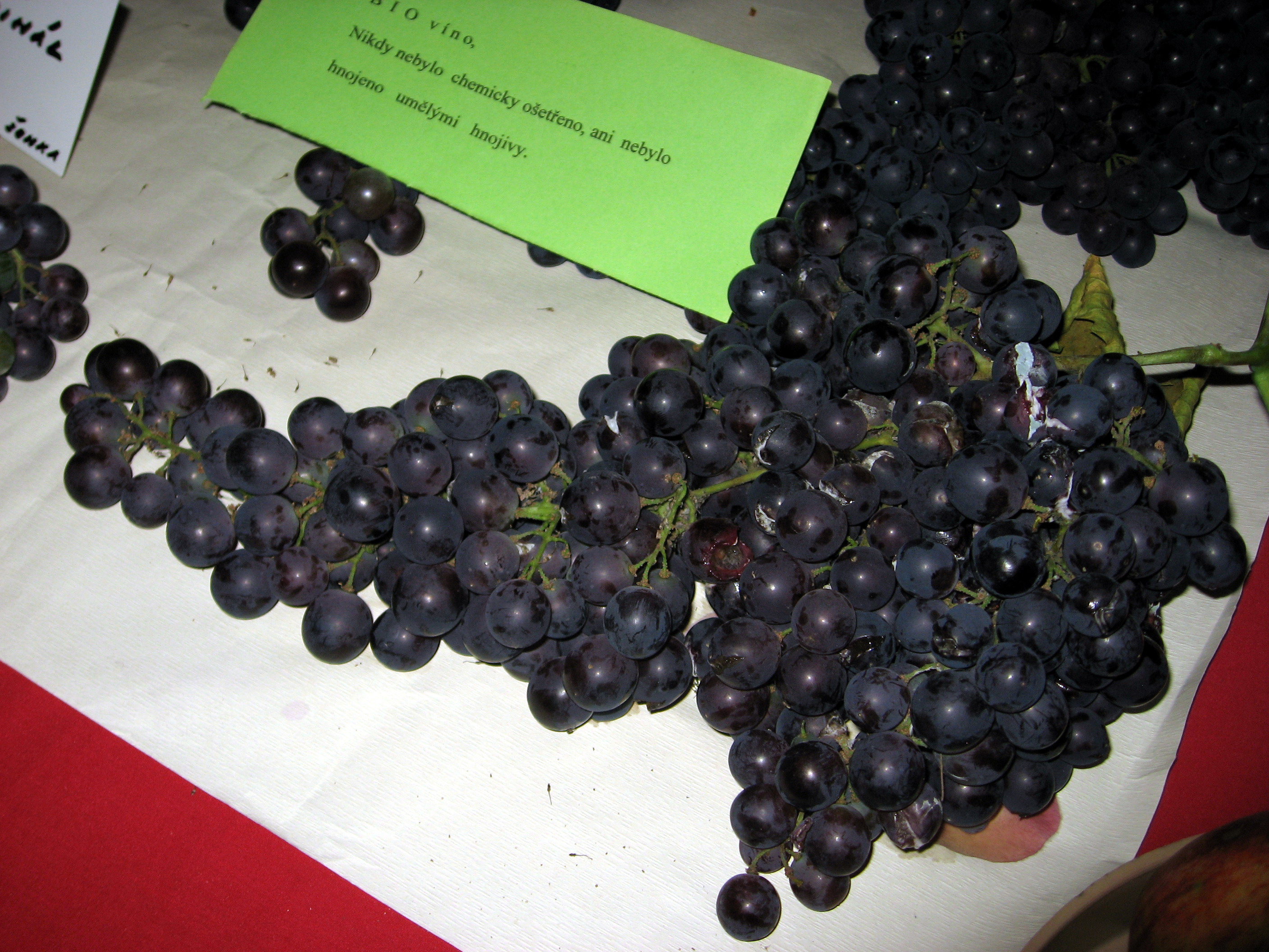 odrůda Kardinál